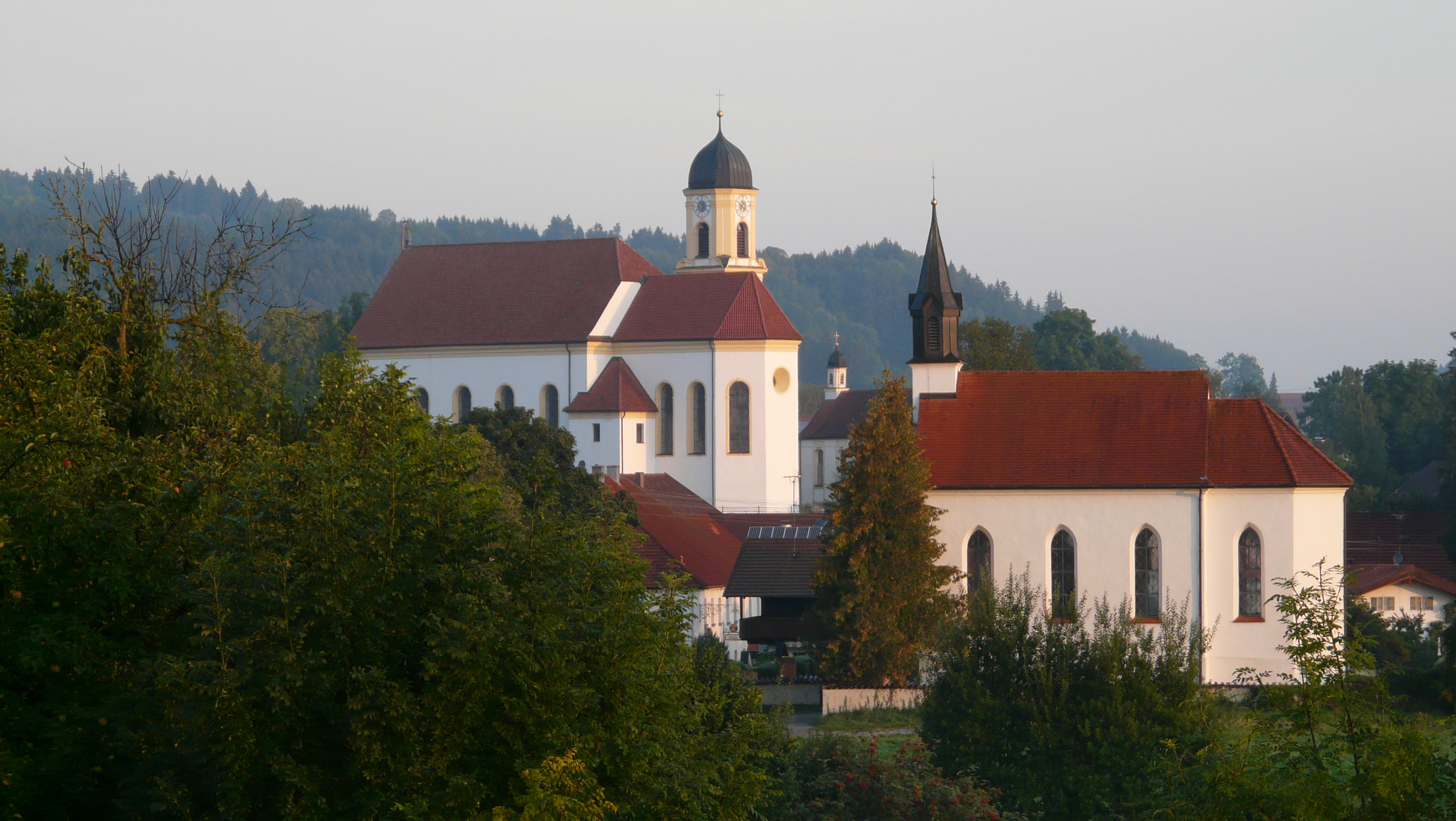 Pfarrkirche St. Nikolaus (links), Kapelle Maria Heimsuchung (Mitte hinten) und die Friedhofskapelle (rechts) in Bernbeuren